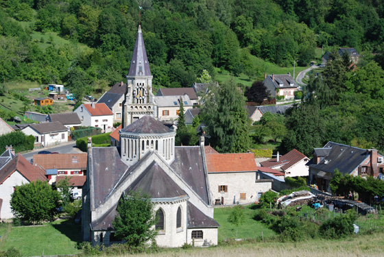 Eglise de Vaudesson 02320